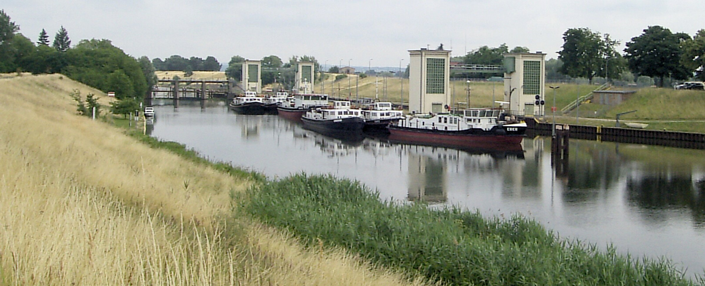 Westschleuse Hohensaaten - Abstieg von der Odervorhaltung (1,2 m über NN, Teil des Oder-Havel-Kanals) in die hier beginnende Hohensaaten-Friedrichsthaler Wasserstraße (0,38 m über NN)